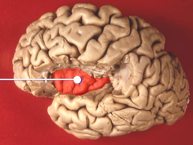 Insular lobes.